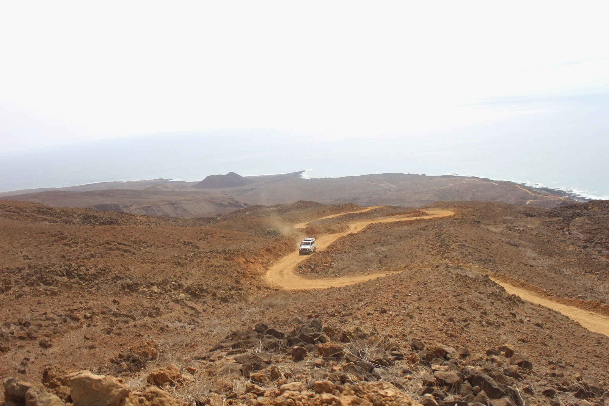 piste reliant Tarrafal de Monte Trigo à Porto Novo, île de Santo Antao (Cap-Vert)